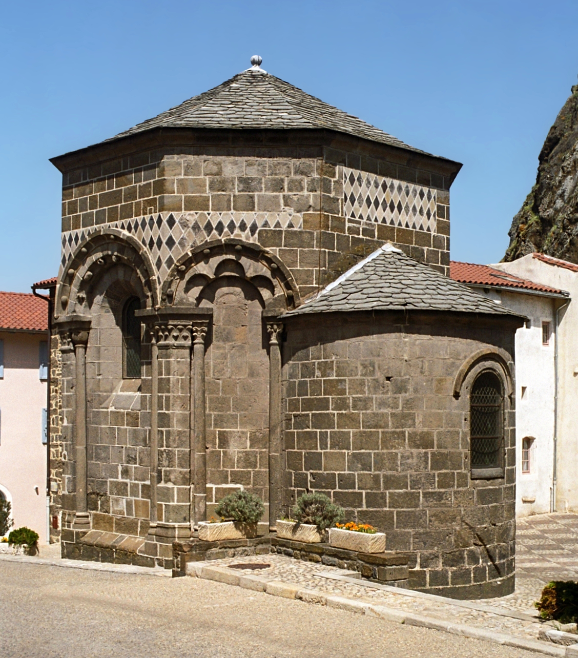 France - Auvergne - Velay - Le Puy - Saint Clair